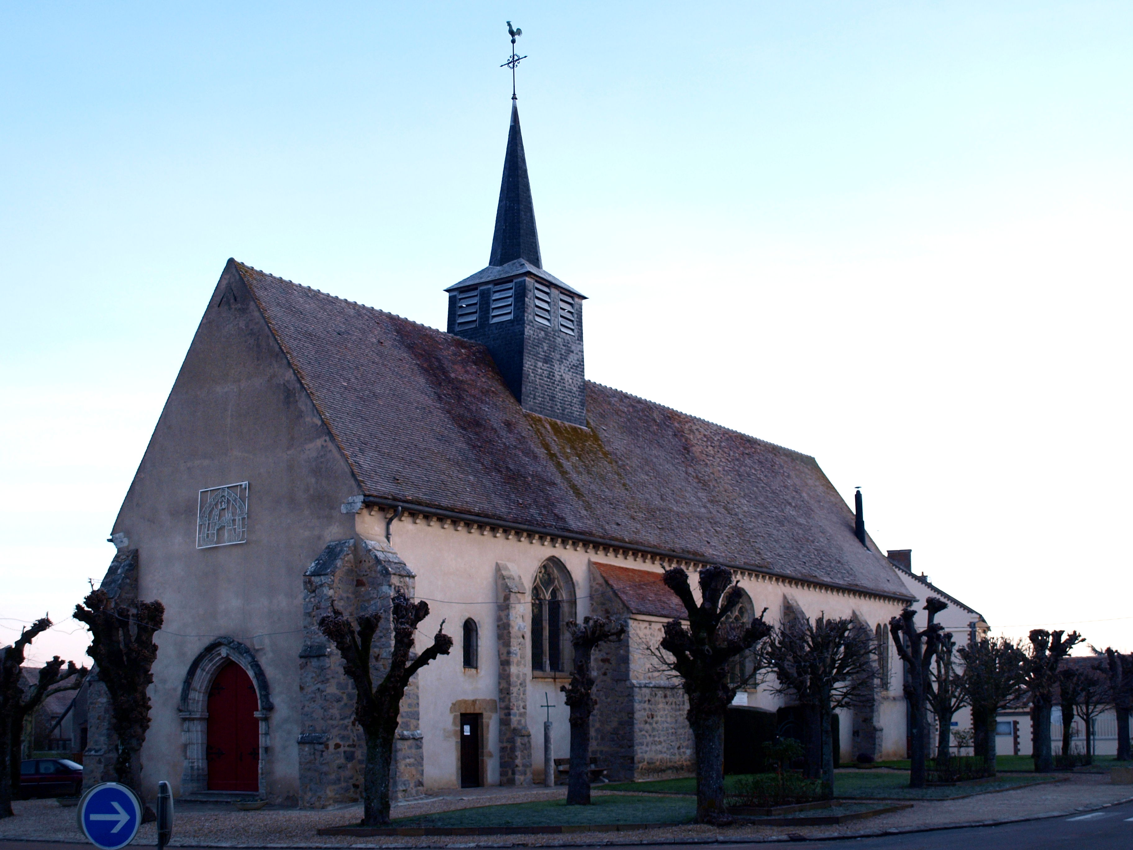 Jouy (Yonne, France) ; l'église en hiver.